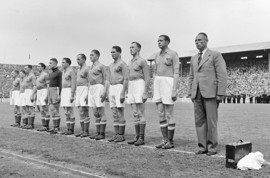 Belgie-Nederland 2-2. Nederlandse Elftal: vlnr: Paauwe (captain), Rijvers, de Vroet, Holleman, Kraak, Dräger, van der Linden, Potharst, Wilkes, Roosen, Kuppen, trainer Kaufman.